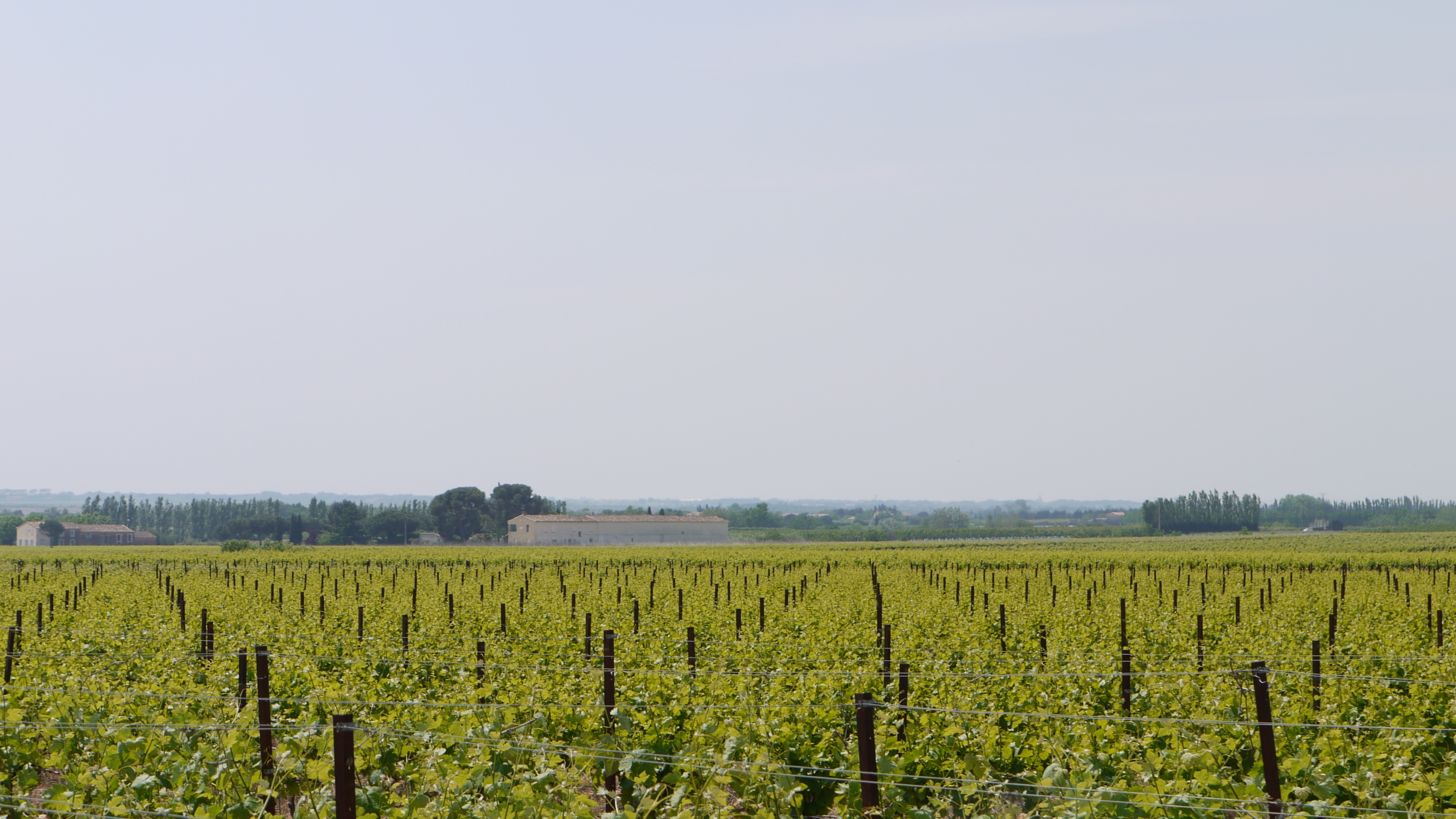 Vignes de Gallician en Petite Camargue